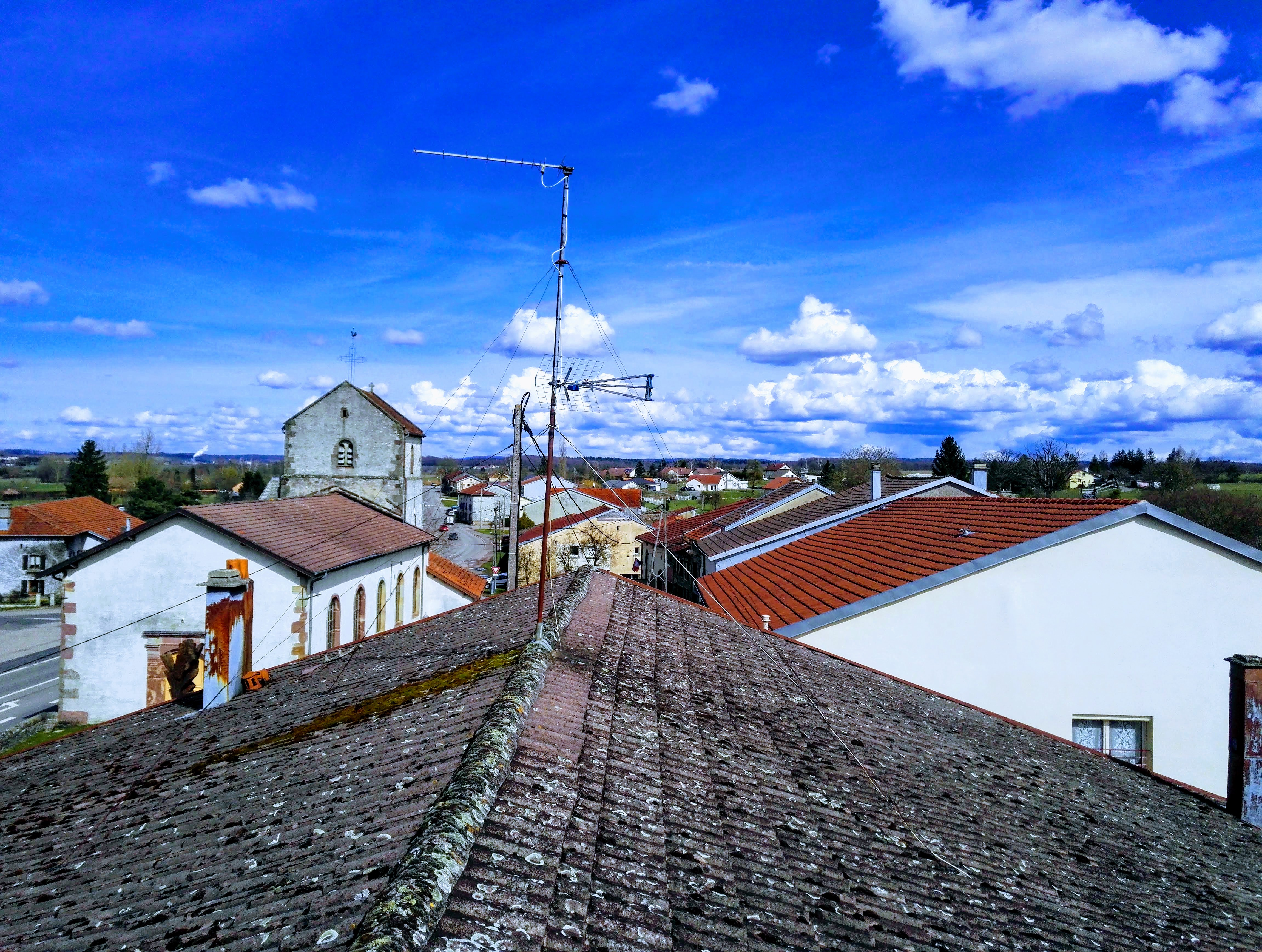 Vue du village de Vomécourt (88700) - France